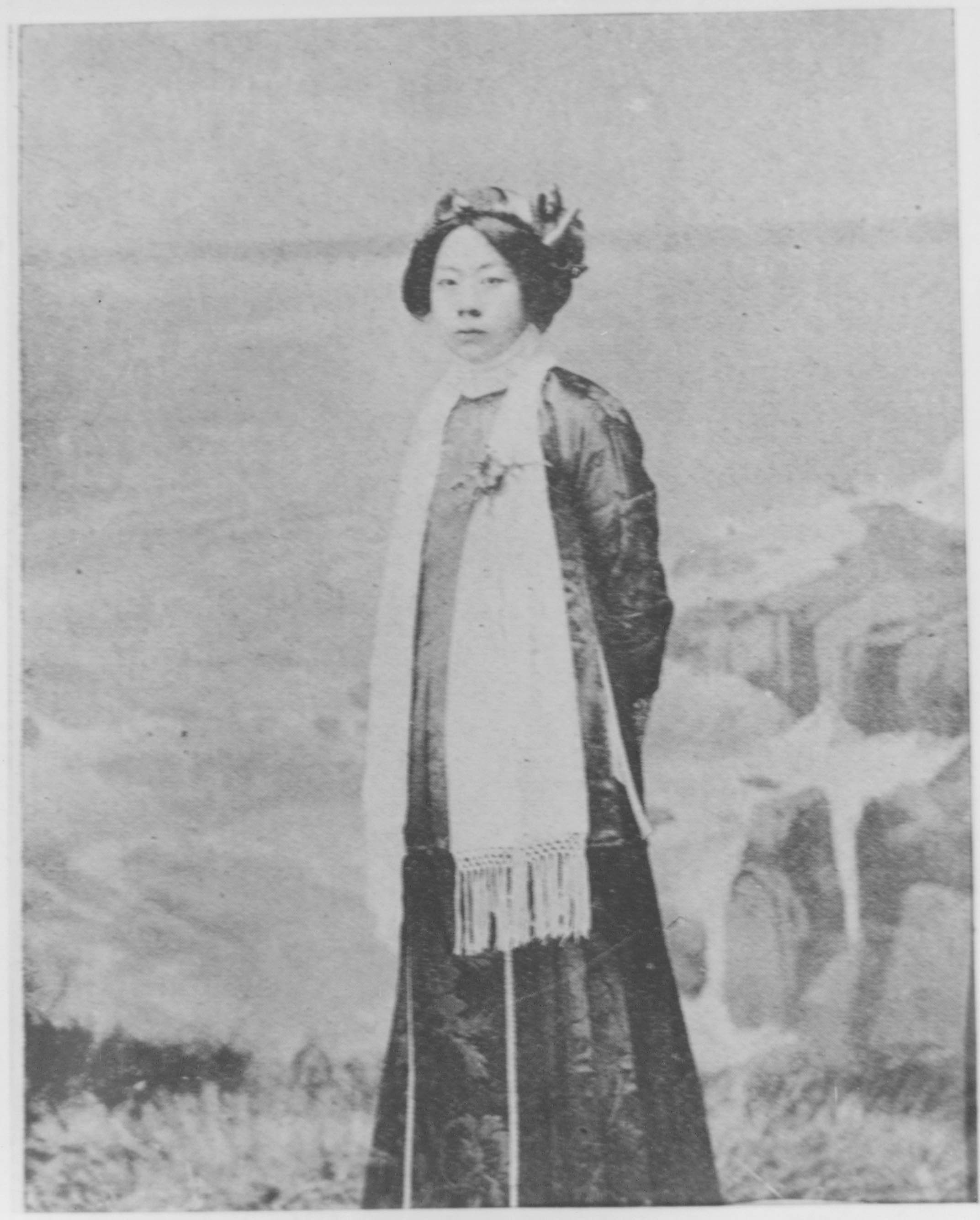 治家全書圖像